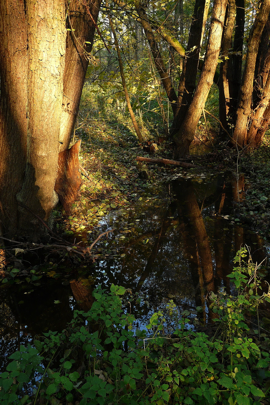 Trnávka před Pilovým rybníkem